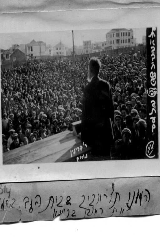 ראובן בריינין נואם לפני קהל בבית העם 1926